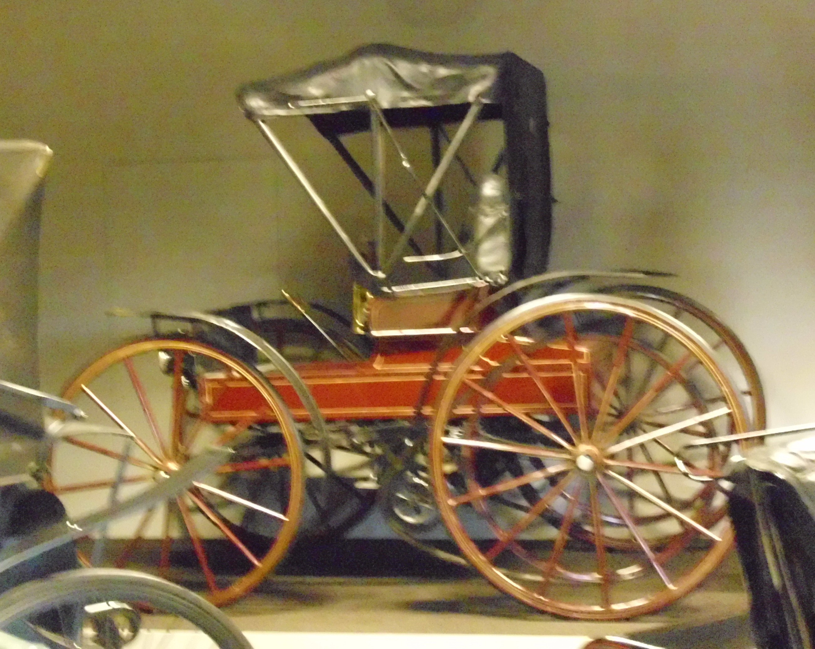 Holsman Highwheeler 1902